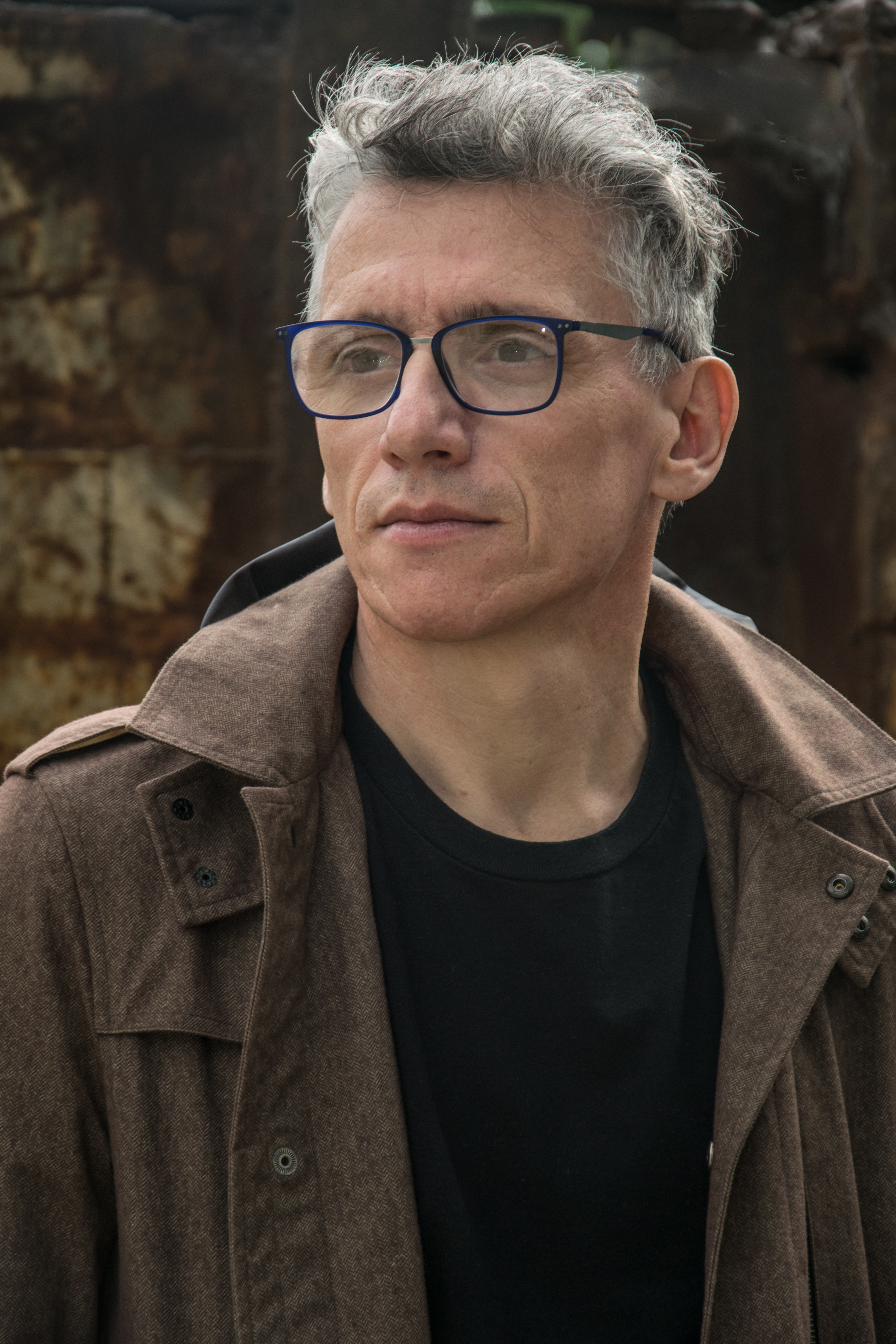 El escritor argentino Carlos Daniel Aletto, enero de 2020